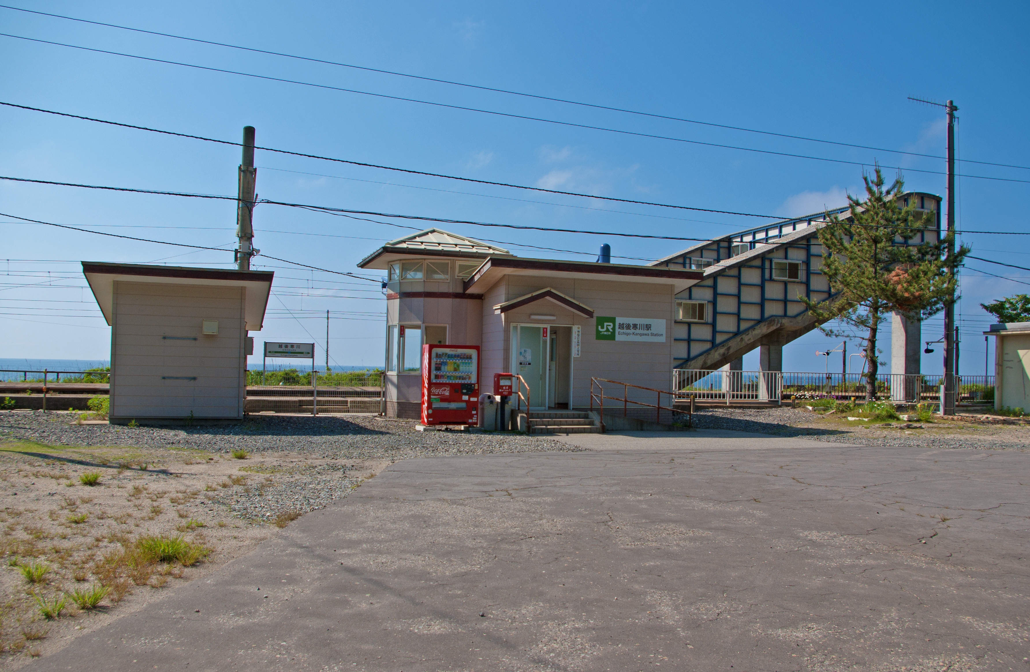 東日本旅客鉄道株式会社羽越本線越後寒川駅